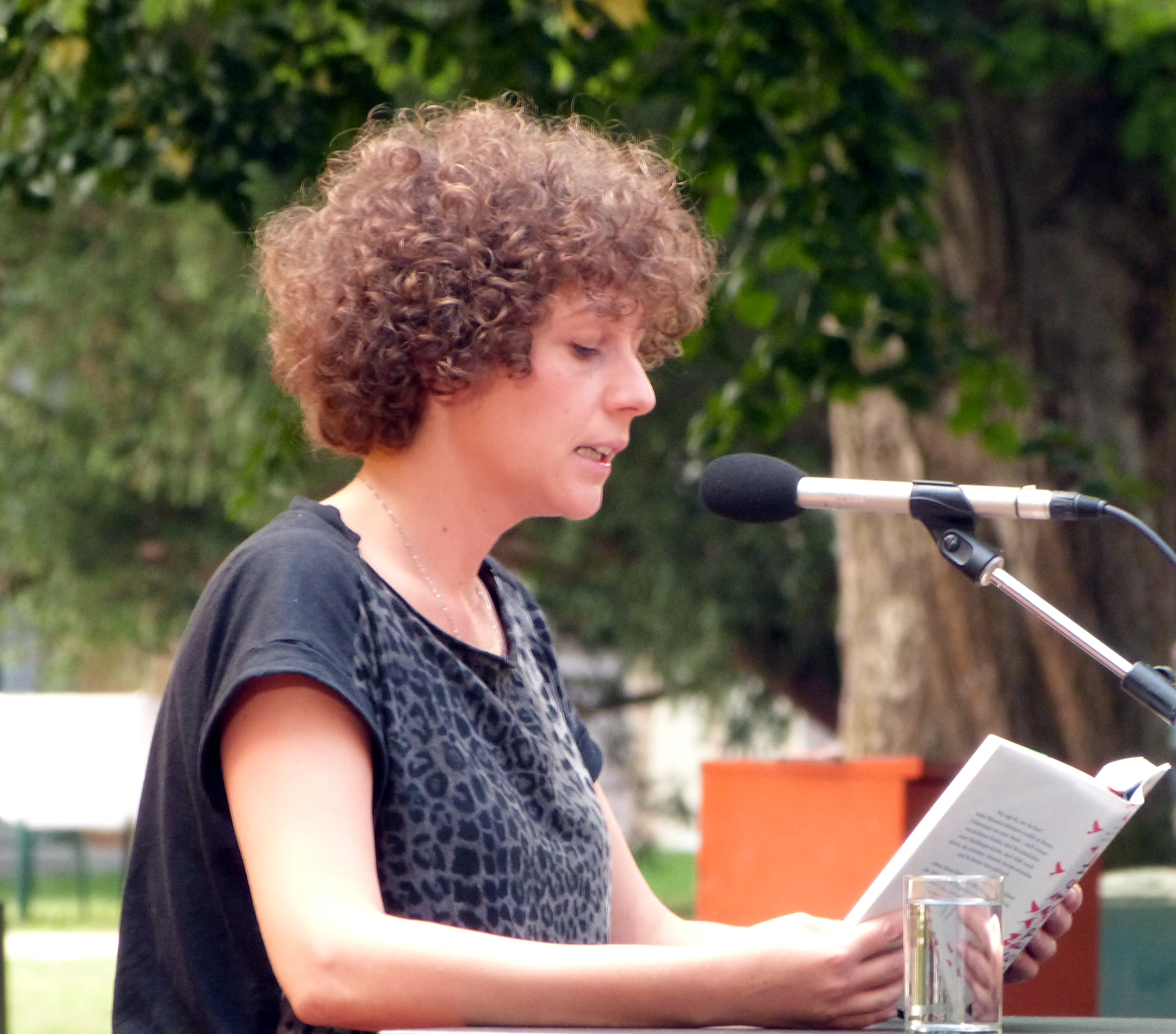 Die Schriftstellerin Sasha Marianna Salzmann bei einer Lesung auf dem Erlanger Poetenfest 2017.